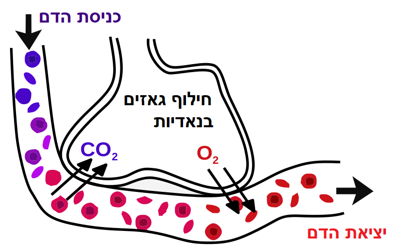 חילופי גאזים בנאדיות הריאה. פחמן דו-חמצני עובר בדיפוזיה מהנים לנאדית וחמצן עובר בדיפוזיה מהנאדית לנים.